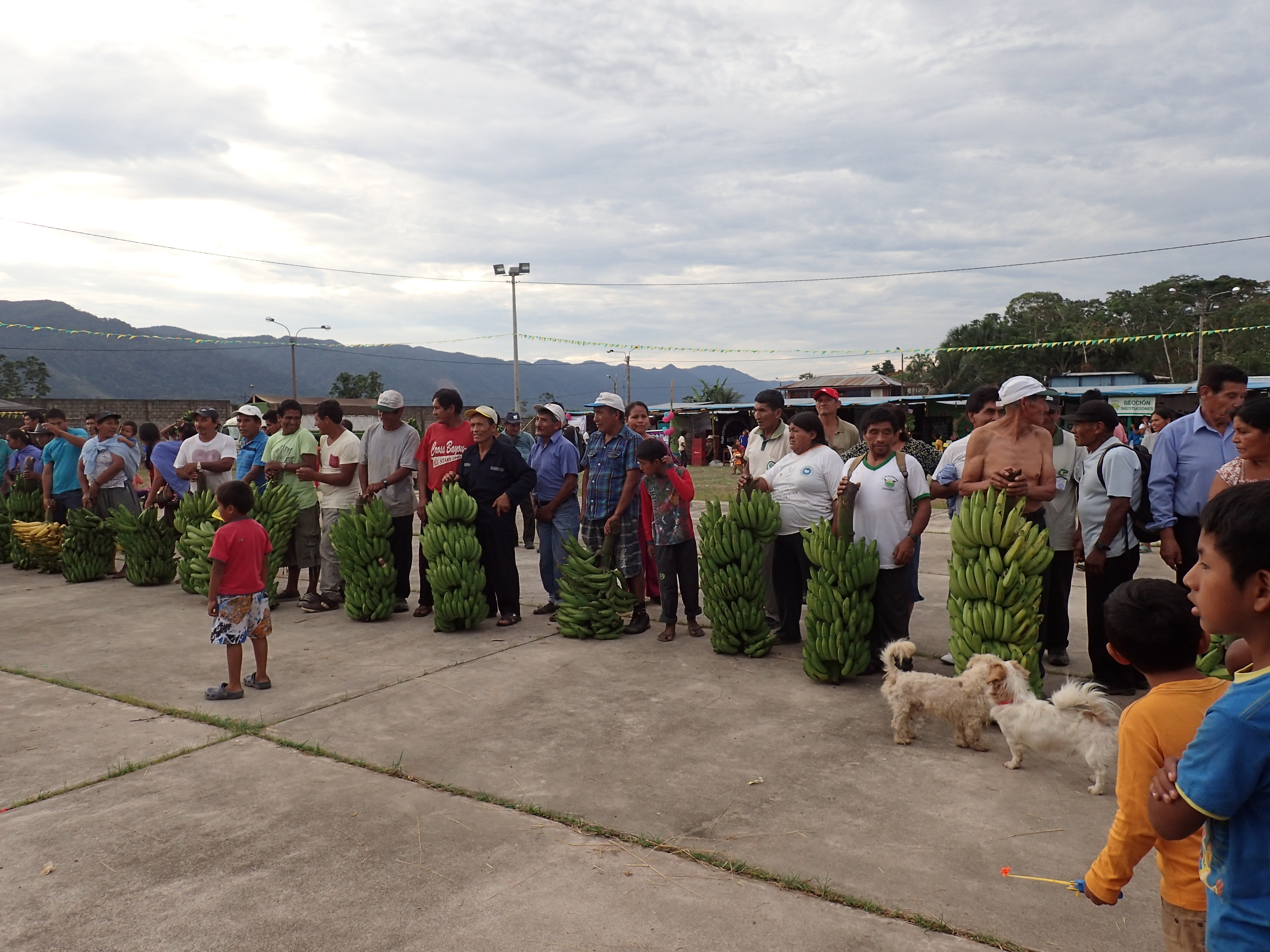 Feria del platano en Salvación, Manu, Perú